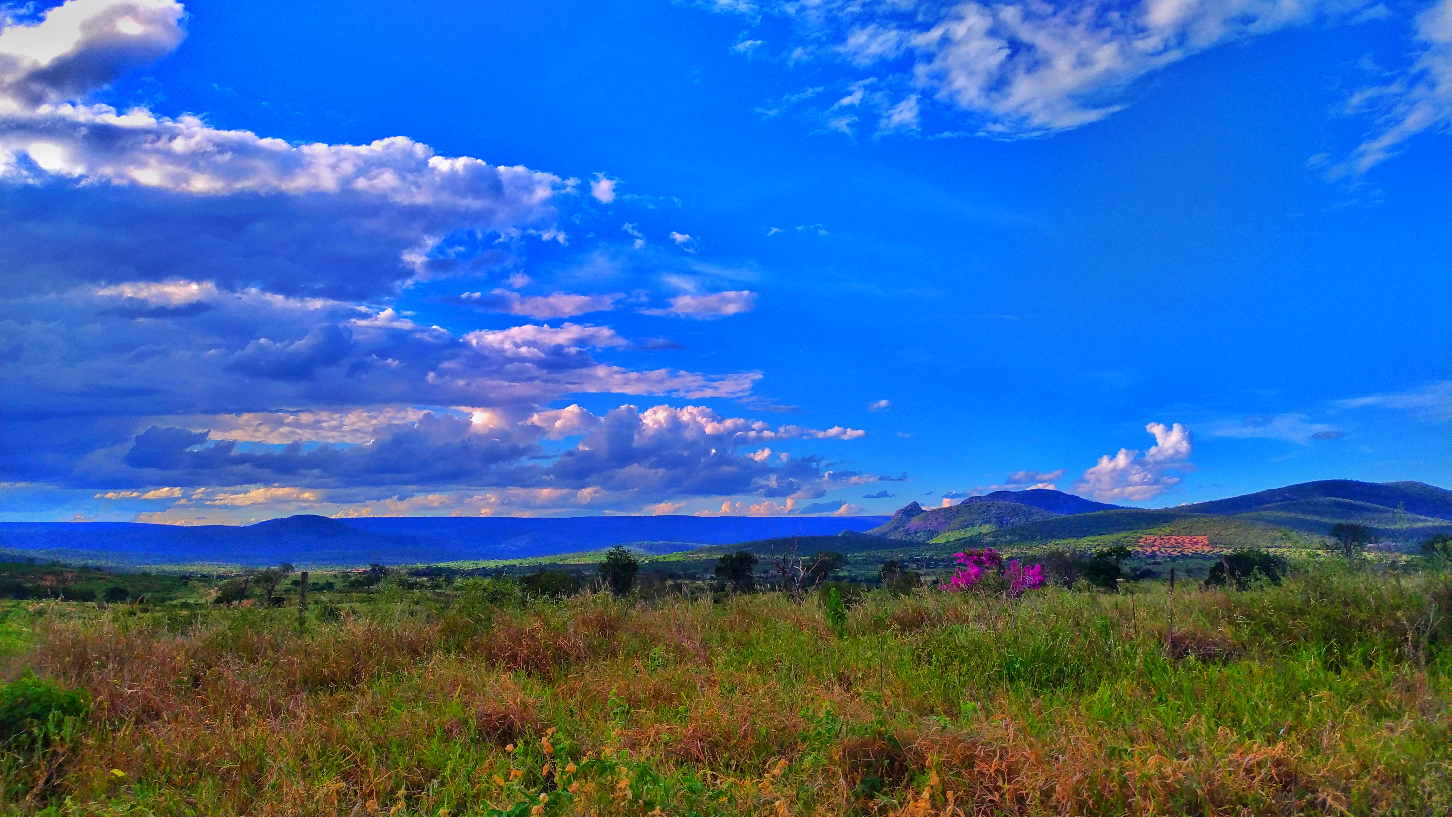 Campo iminente ao Rio Jequitinhonha, no qual não aparece na imagem. O céu azul e vegetação rasteira característica da Região do Vale do Jequitinhonha é o destaque da imagem.